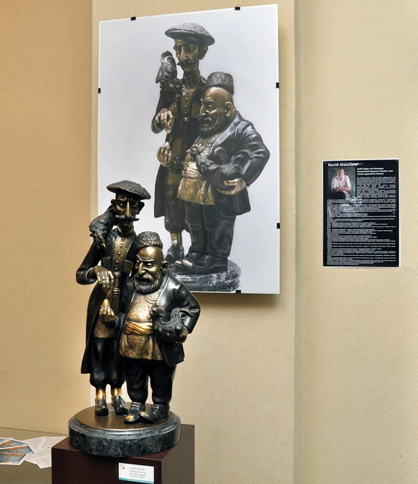 Праздник Весны. Автор Катиб Мамедов